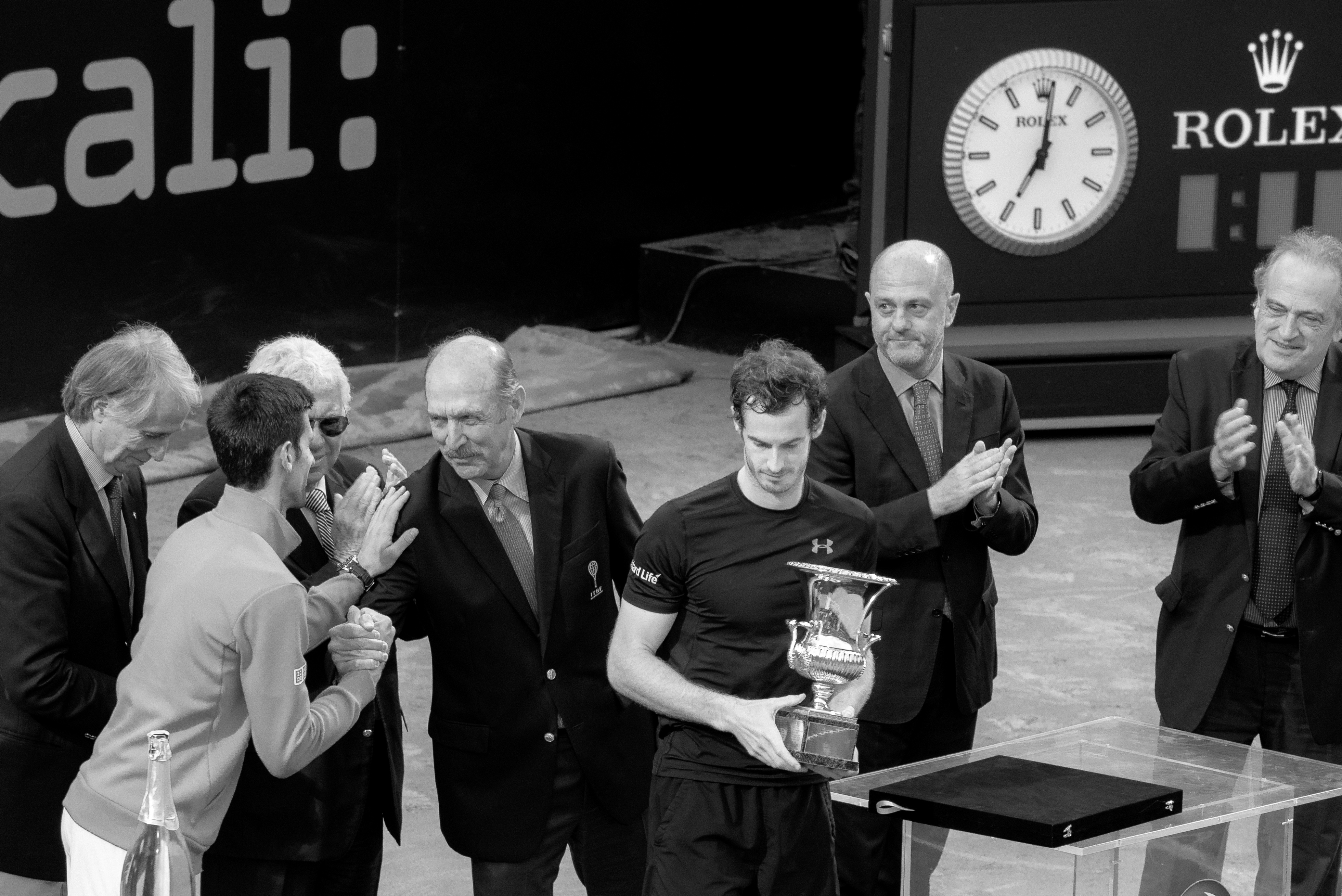 Internazionali BNL d'Italia 2016. Roma. #ibi16